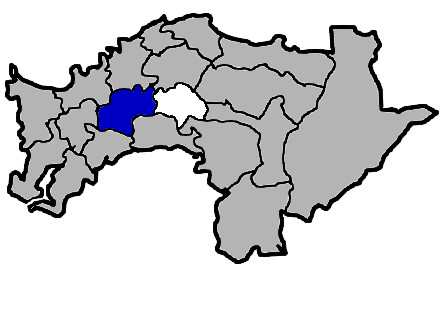 KaurJmeb為編輯臺灣省嘉義縣太保市，於2005年2月10日所繪。